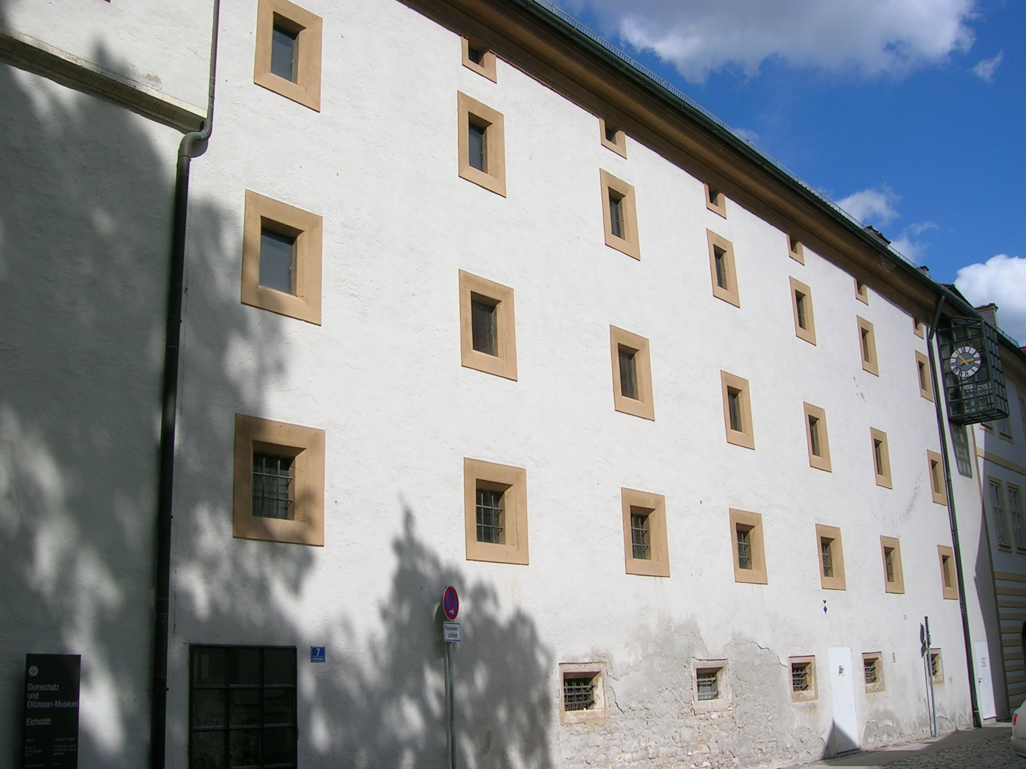 Ehem. Getreidekasten des Domkapitels, sog. Kipfenberger Speicher, viereinhalbgeschossiger Traufseitbau, 16. Jh., 1979-82 von Karljosef Schattner zum Diözesanmuseum umgebaut.